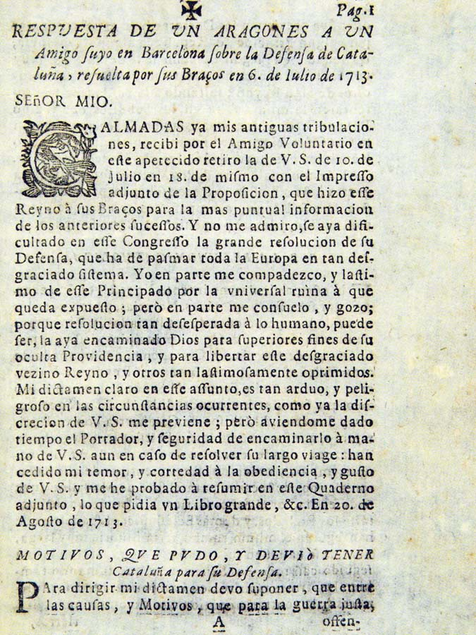 Propaganda austracista: Respuesta de un Aragonés a un Amigo suyo en Barcelona sobre la Defensa de Cataluña